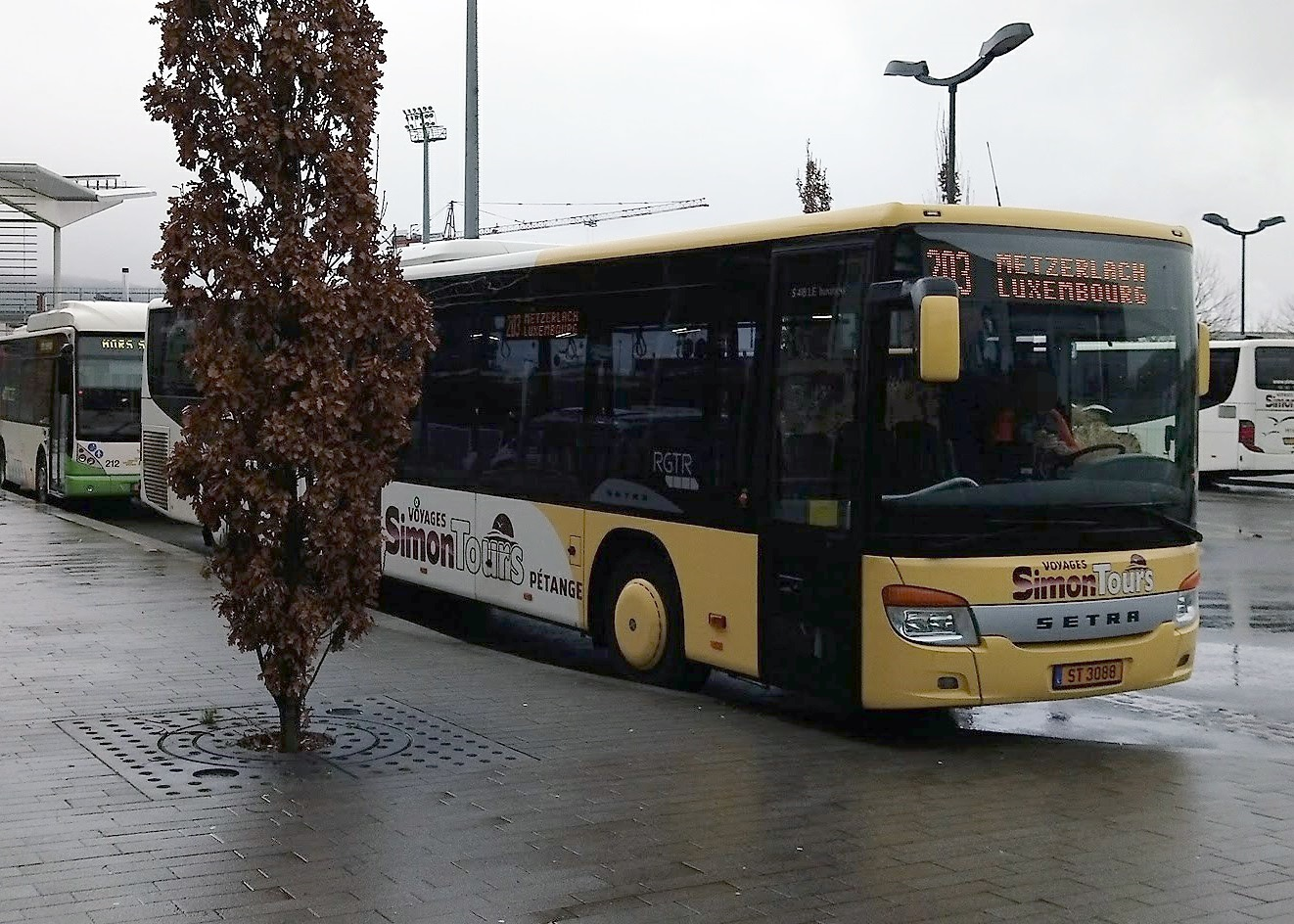 Differdange, autobus ST3088, société Simon-Tours, ligne 203